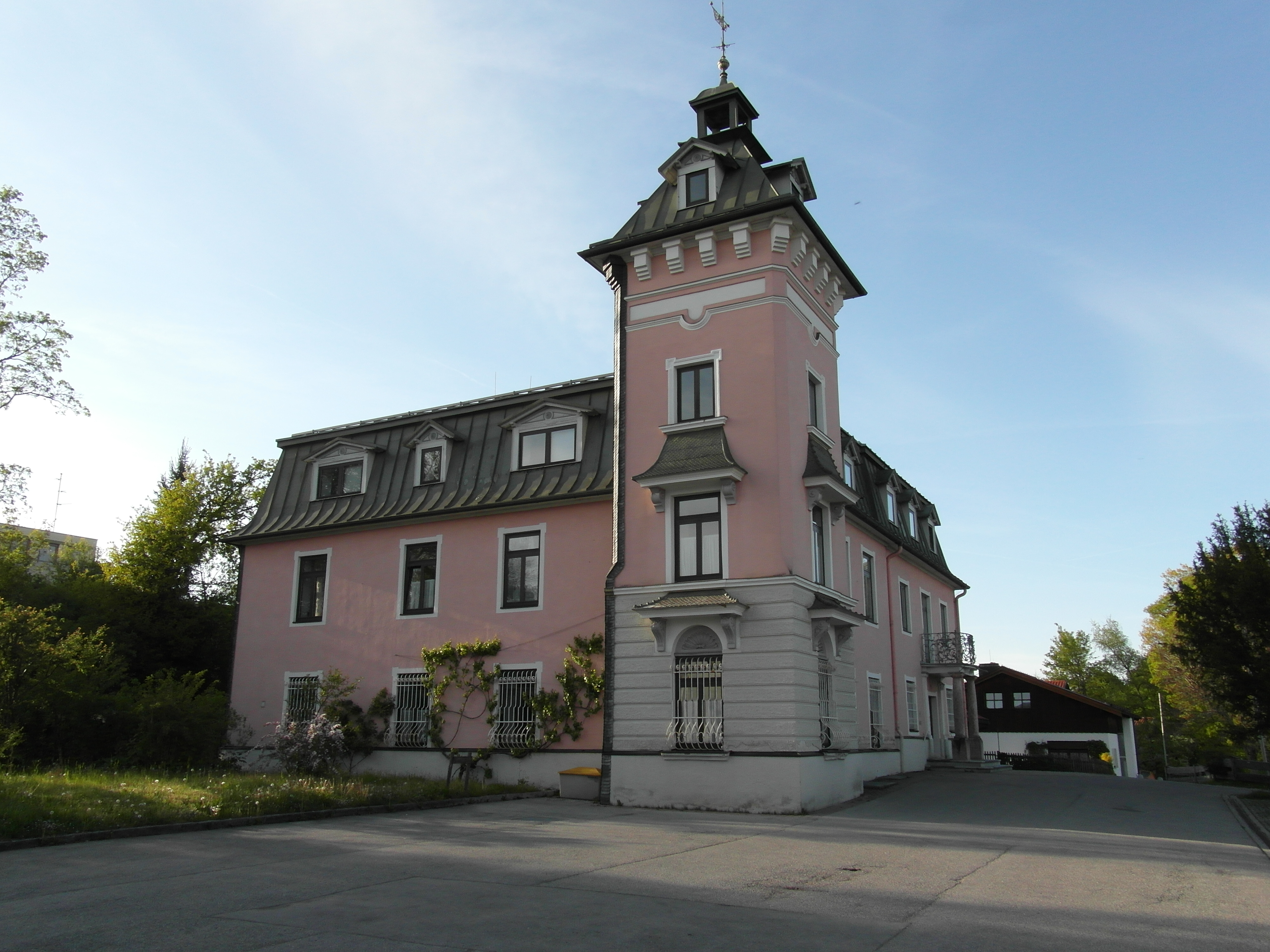 Traunstein, Schloßstraße 15 a; sog. Kernschloss, jetzt Pfarrhaus, östlicher Teil als Gartenschlösschen um 1770 errichtet, im 19. Jahrhundert um Westflügel erweitert, beide Bauteile 1898 überformt und vergrößert, mit Eckturm.